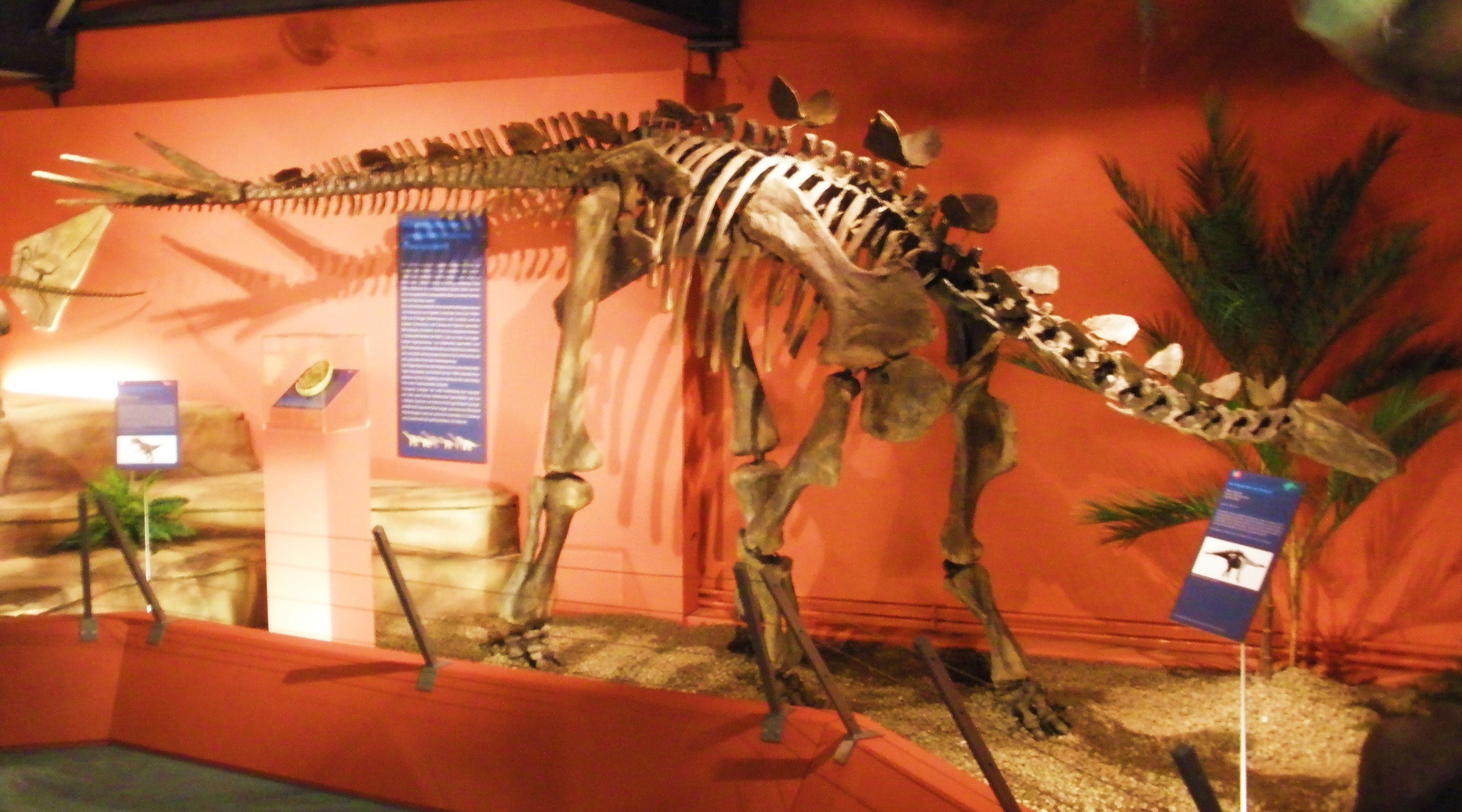 fossil Miragaia